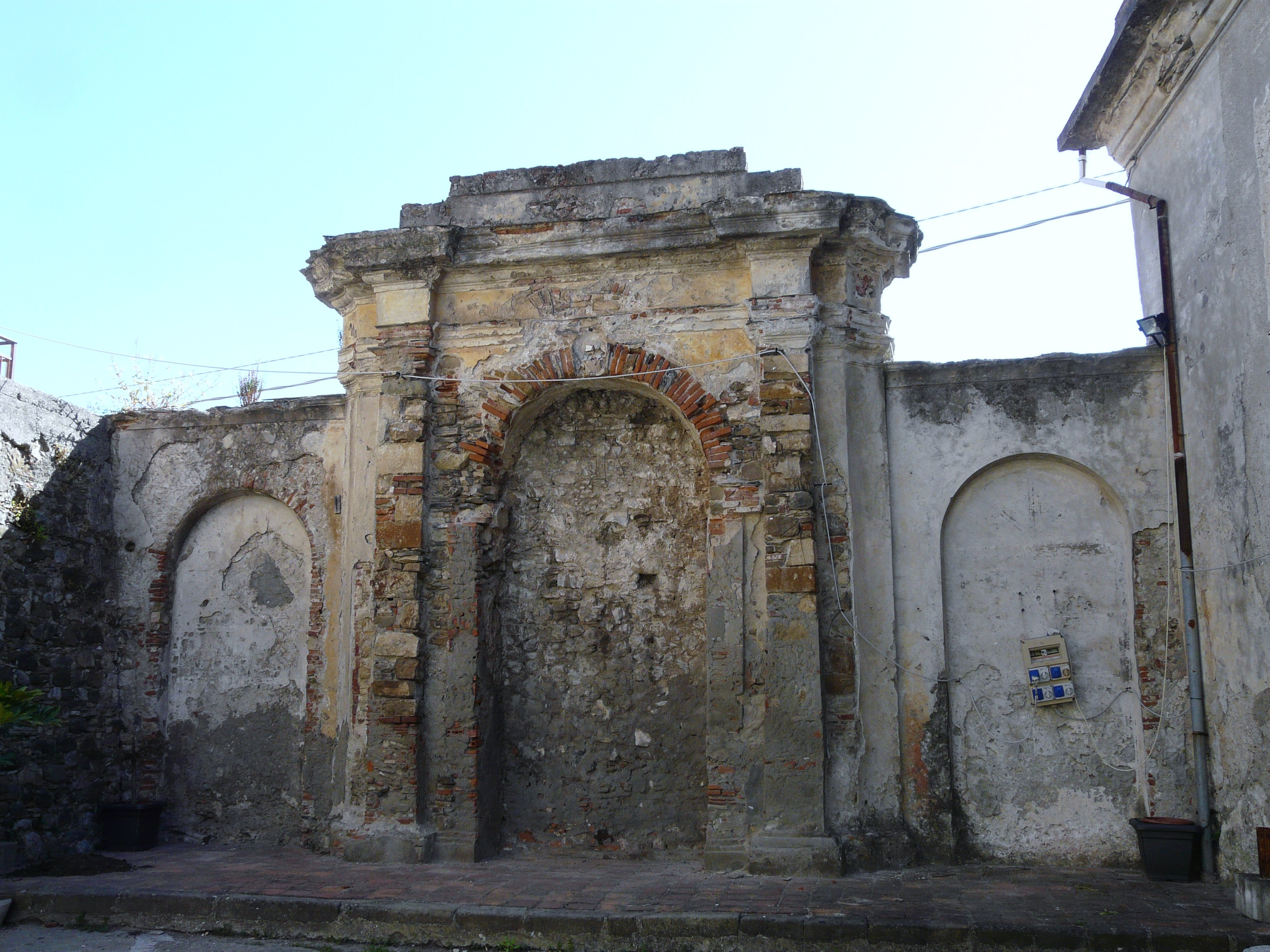 Palazzo Remedi, Ponzano Superiore, Santo Stefano di Magra, Liguria, Italia